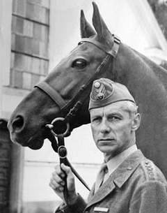 Gustaf Nyblaeus